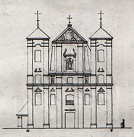 Беларуская (тарашкевіца): Клецак (Klecak), пляц Рынак (plac Rynak). Касьцёл дамініканаў